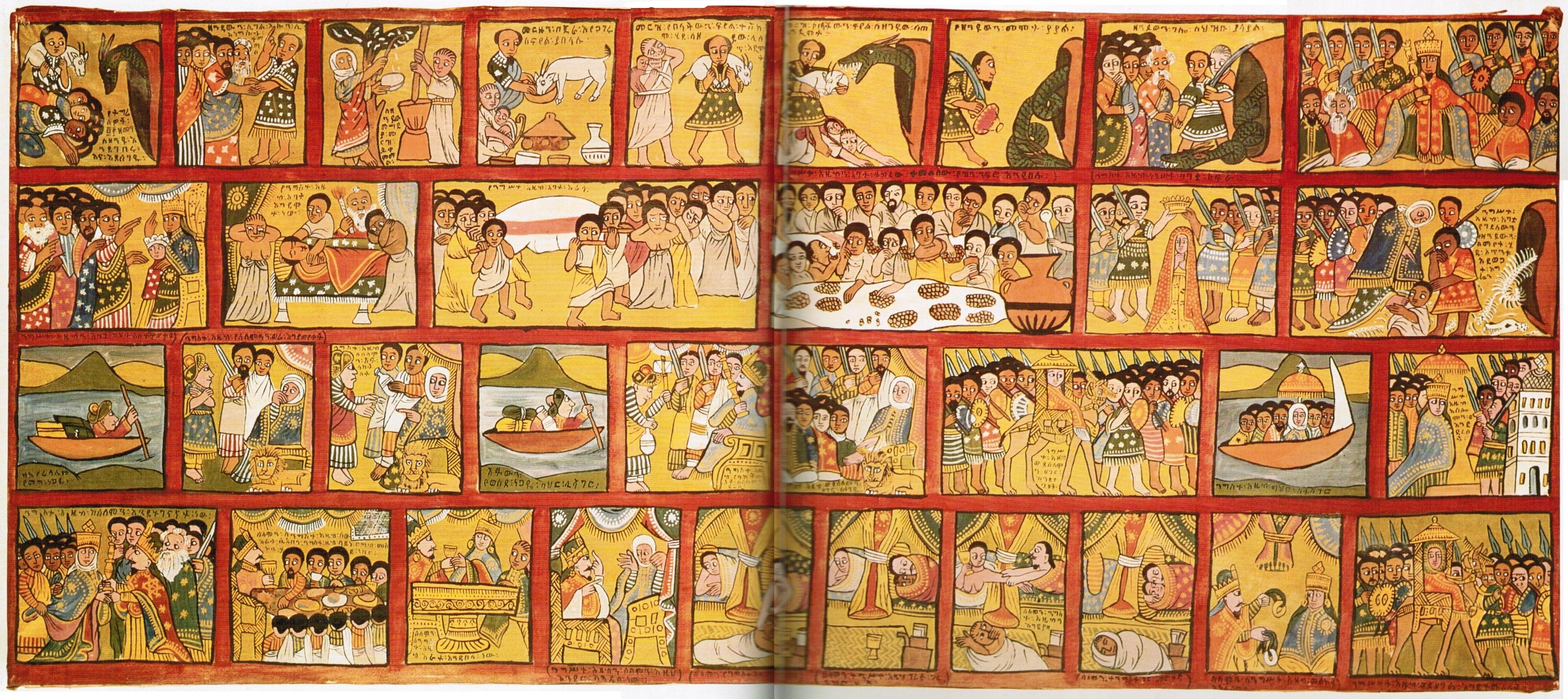 Queen of SabaЦарица Савская. Слева направо. Первый ряд: Жители Савы приносят жертвы змее, желая её задобрить Отец будущей царицы Агав убивает змею Он собирает ядовитых гусениц, чтобы жена растолкла их в ступе Агав кормит отравленной кашей козу С козой на плечах он идет к змее Змея проглатывает отравленную козу Агав убеждается, что змея мертва Народ восхищается подвигом героя В благодарность за подвиг Агава провозглашают царем Второй ряд: Агав демонстрирует народу свою маленькую дочь Азив и объявляет девочку наследницей престола Смерть Агава Пышное погребение Торжественные поминки Царица Азив на троне своего отца Царица Азив осматривает скелет змеи Третий ряд: Купец из Иерусалима пересекает Красное море Царица Азив слушает рассказ еврейского купца о Соломоне Царица Азив вручает купцу благовония в качестве подарка для Соломона Еврейский купец возвращается домой Купец передает царю Соломону благовония и послание от царицы Азив Азив размышляет, ехать ли ей к царю Соломону Азив со свитой отправляется в дальнее путешествие На корабле царица сидит под золотым палантином Прибытие царицы Азив во дворец царя Соломона Четвертый ряд: Встреча царицы Азив с царем Соломоном Соломон дает пир для свиты царицы Соломон приглашает царицу Азив разделить с ним его трапезу Соломон обещает Азив не трогать её, если она даст обещание ничего не красть из дворца Азив приказывает служанке принести ей в постель воды Соломон хватает служанку и спит с ней Узнав, что царица утоляет жажду водой, Соломон говорит, что она нарушила свое обещание ничего не брать во дворце Соломон спит с царицей Азив При расставании Соломон дает царице два "опознавательных знака": один золотой, а другой серебряный. Если у нее родится сын, она должна послать ему золотой, а если дочь - то серебряный "знак". Царица Азив возвращается в свою страну